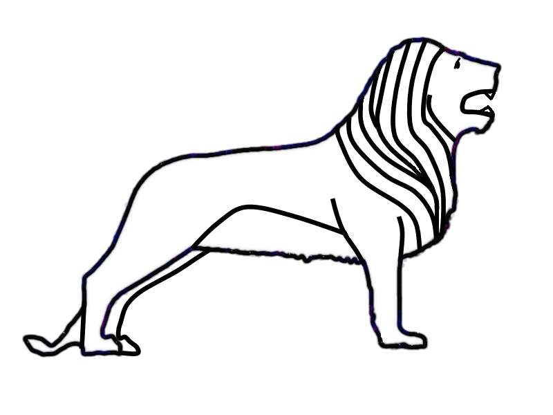 Divisionsabzeichen der 31. Infanterie-Division